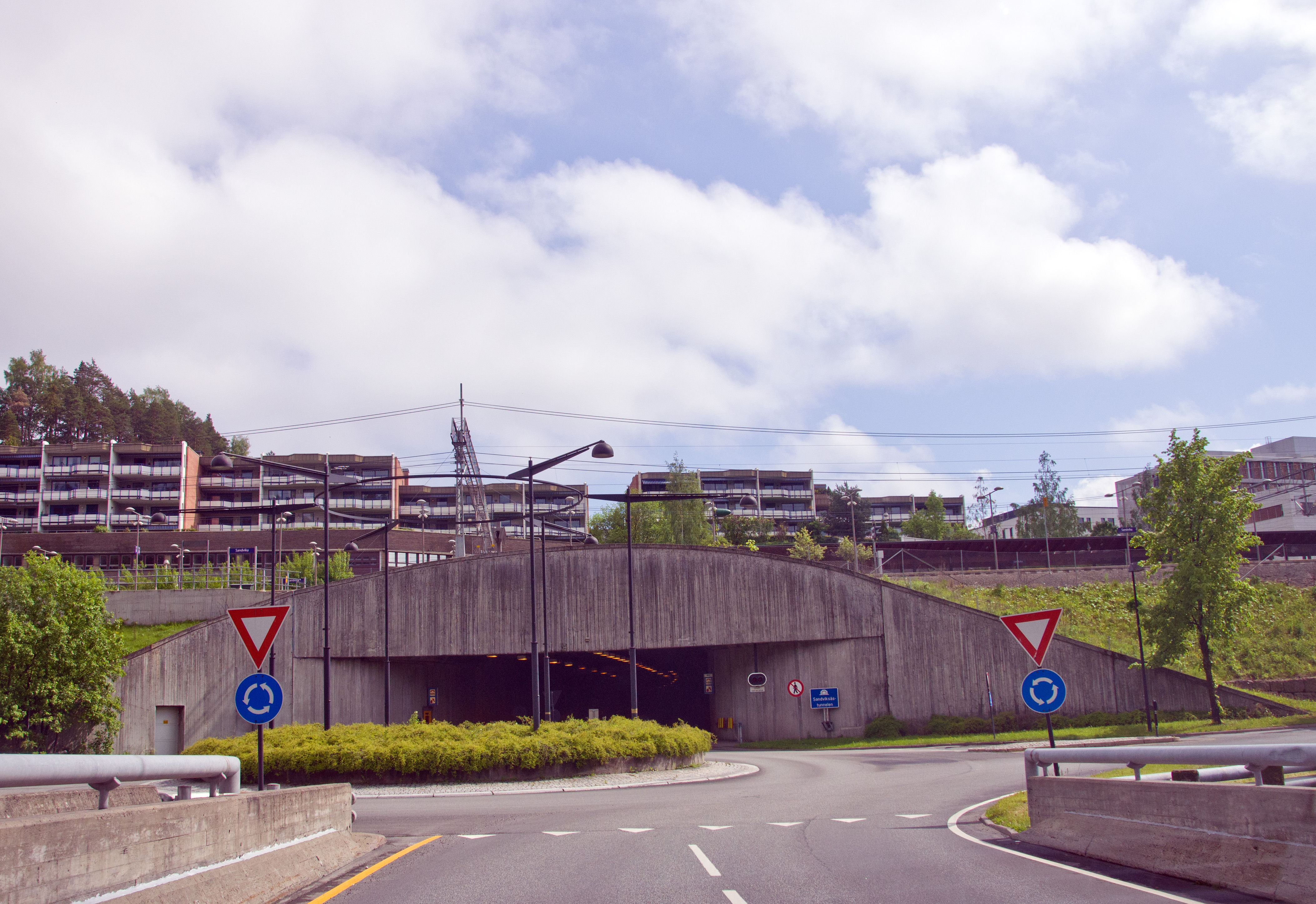 Sandviksåstunnelen ved Sandvika